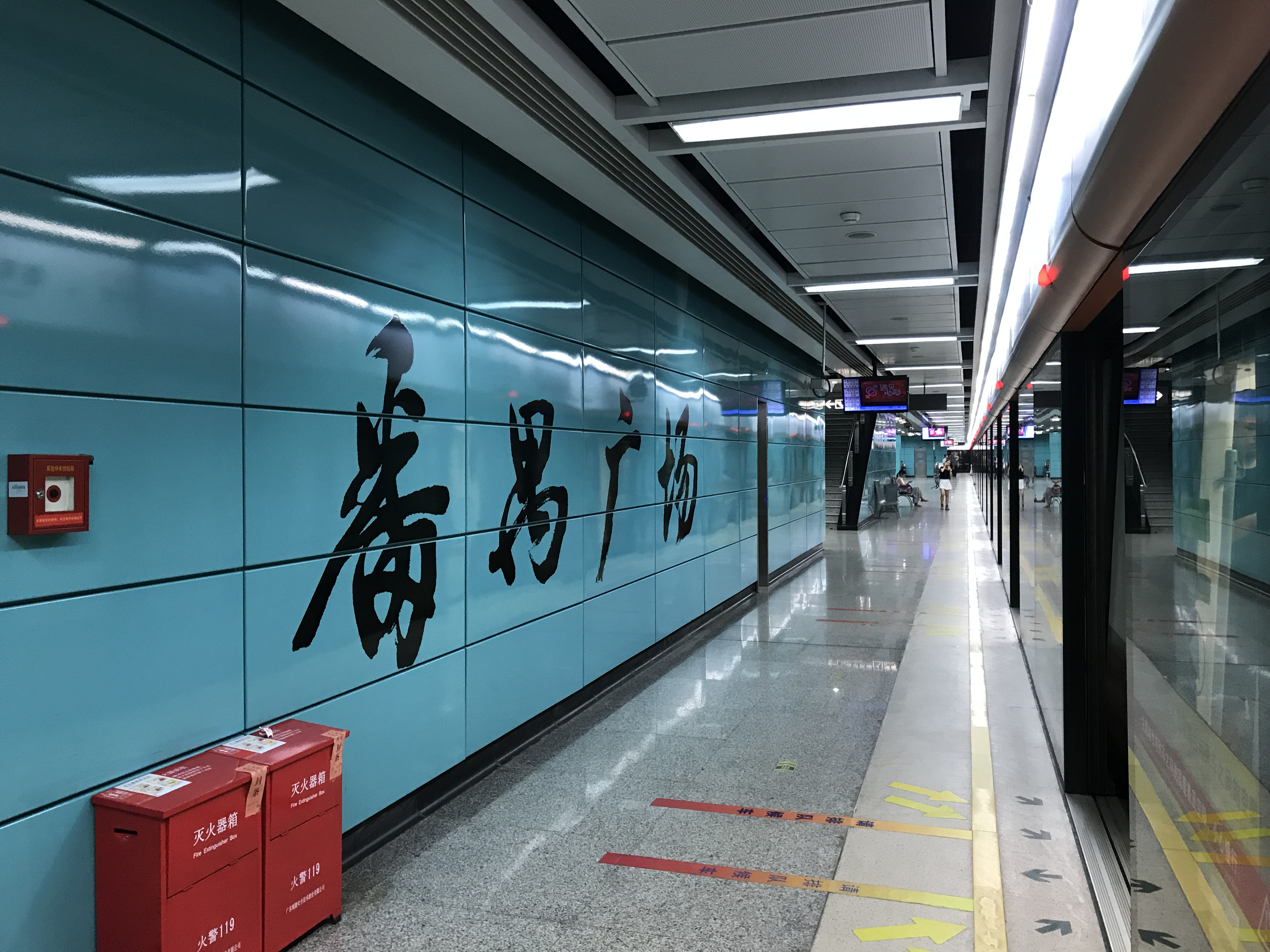 广州地铁番禺广场站